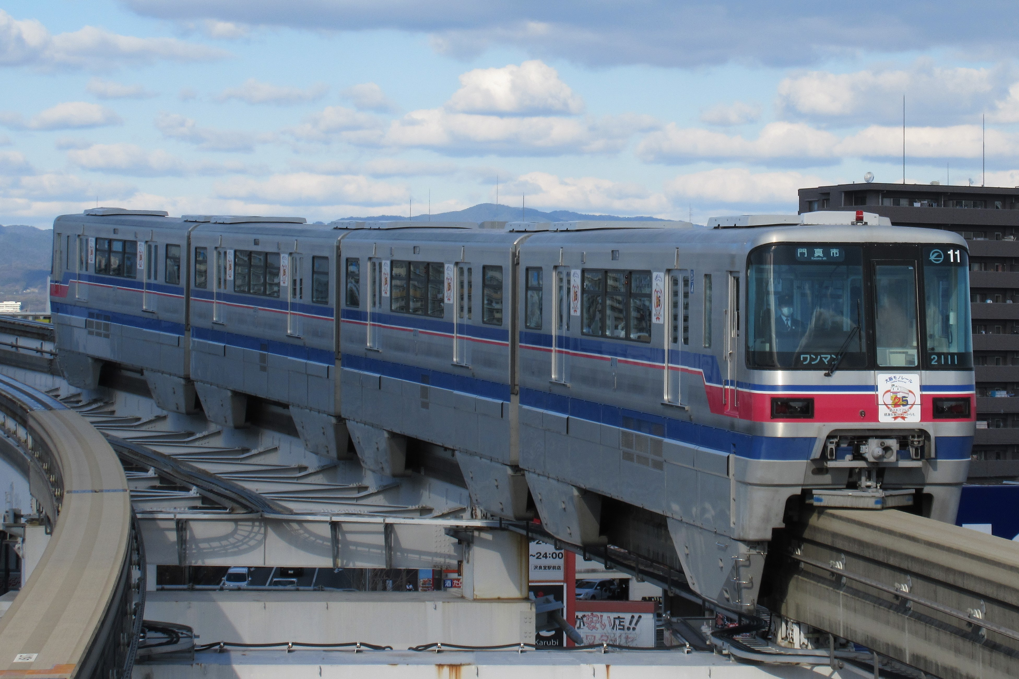 大阪モノレール2111 (沢良宜駅にて)